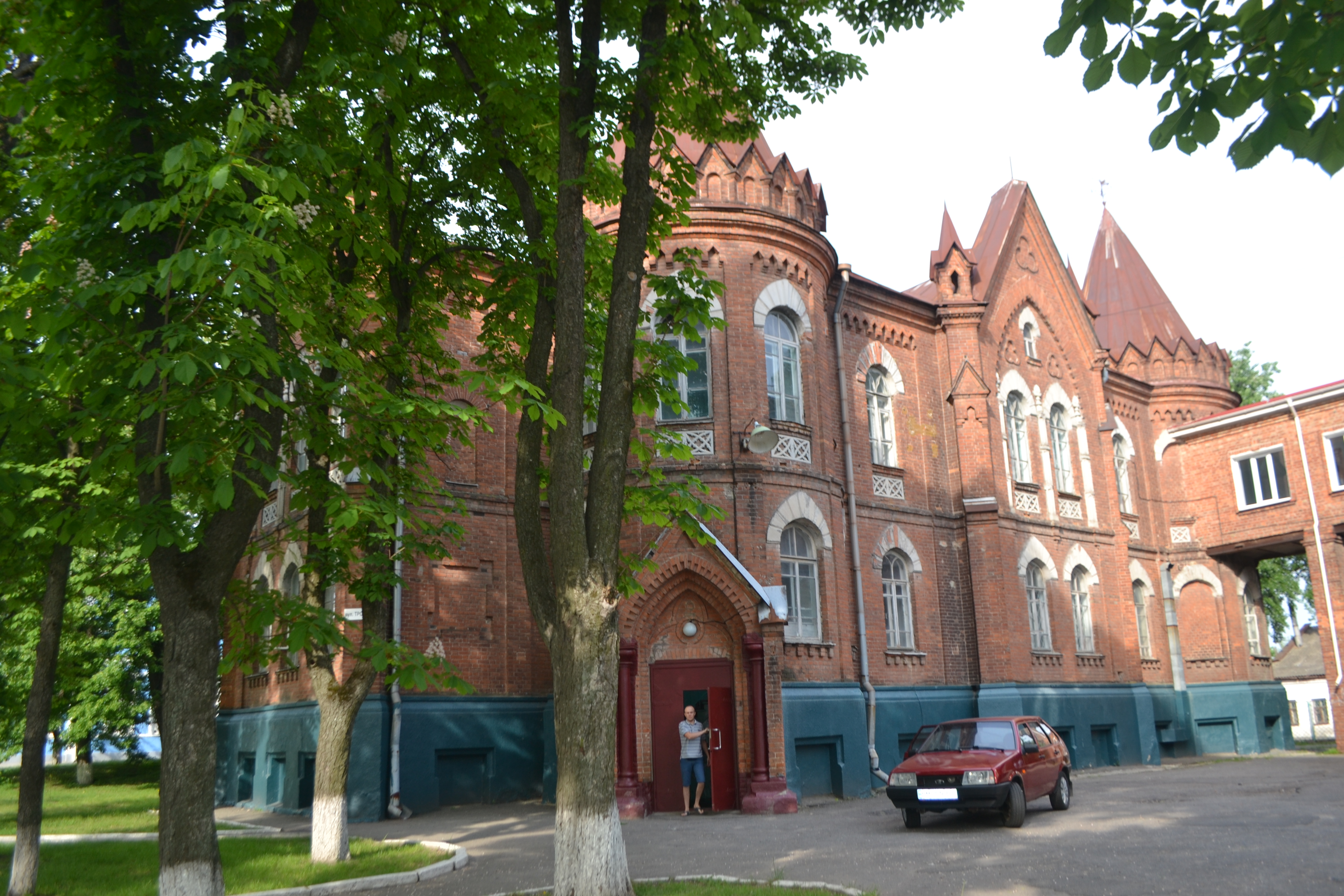 Олександрівська чоловіча гімназія (мур.), Суми, вул. Троїцька, 3, 5